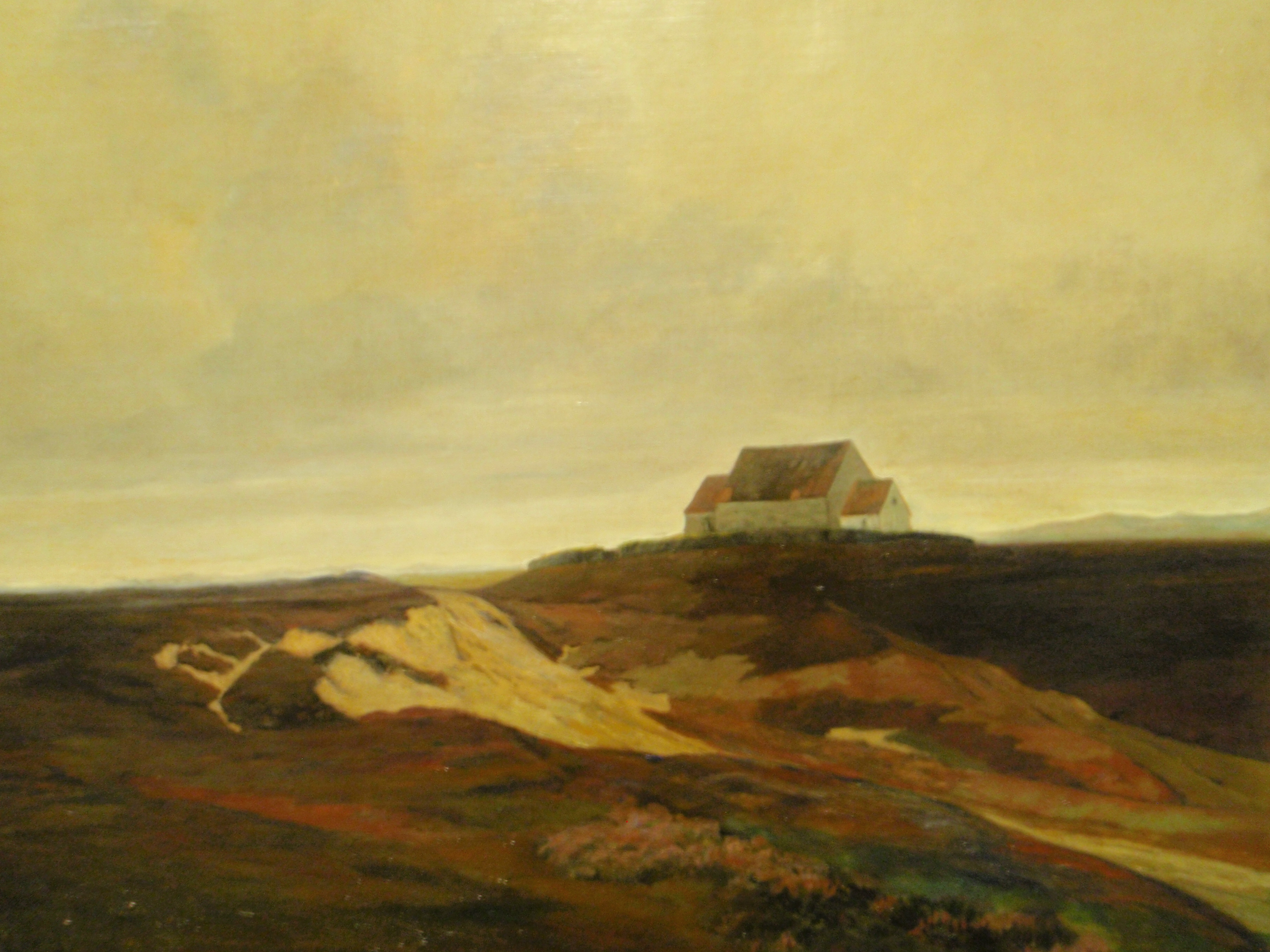 Bildet henger i Bergen kunstmuseum